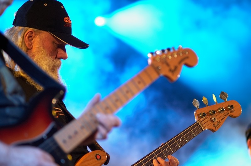 Beno Otrę™ba of Dżem, playing at Rzeszowskie Juwenalia 2007 concert.